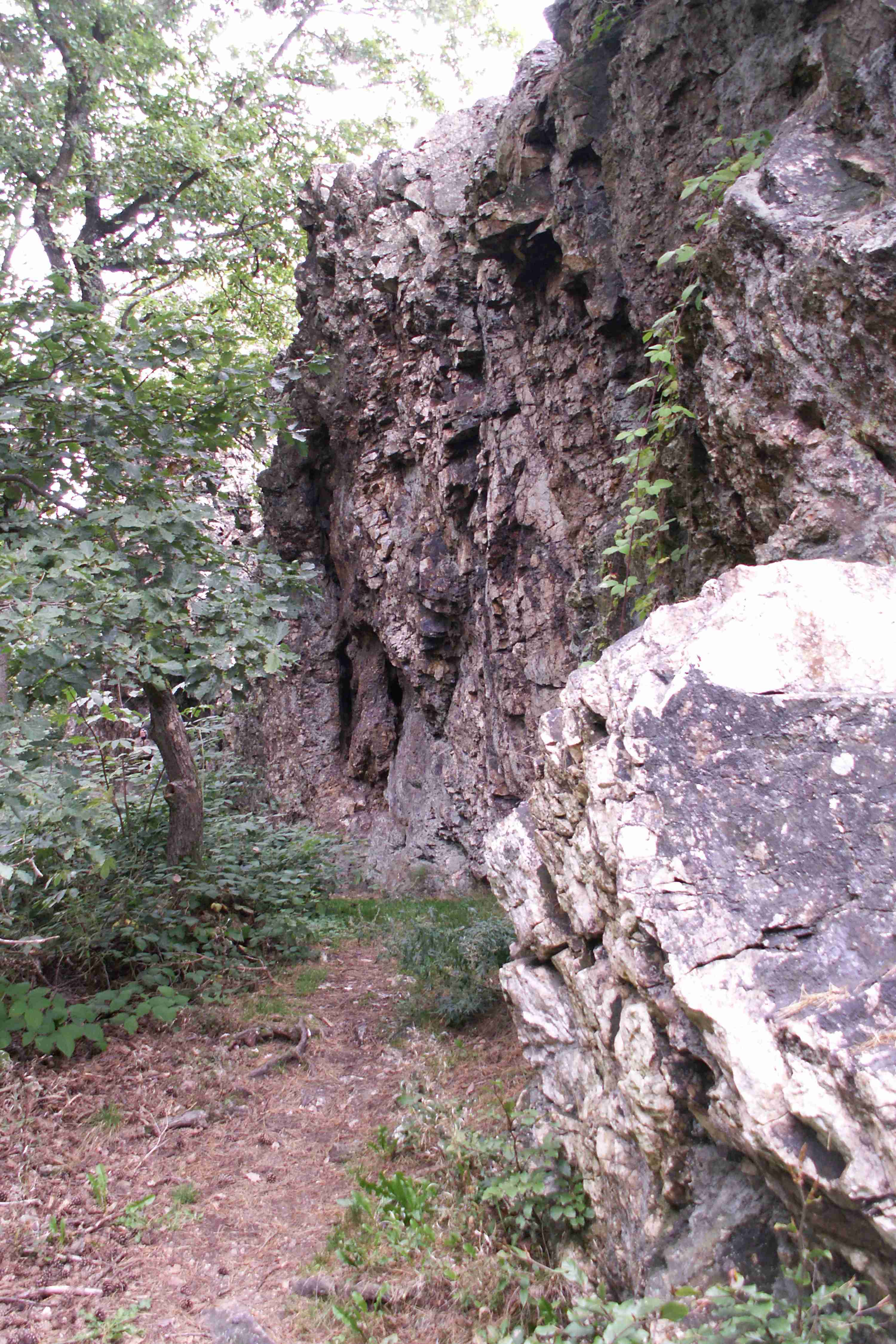 Quarzitblock